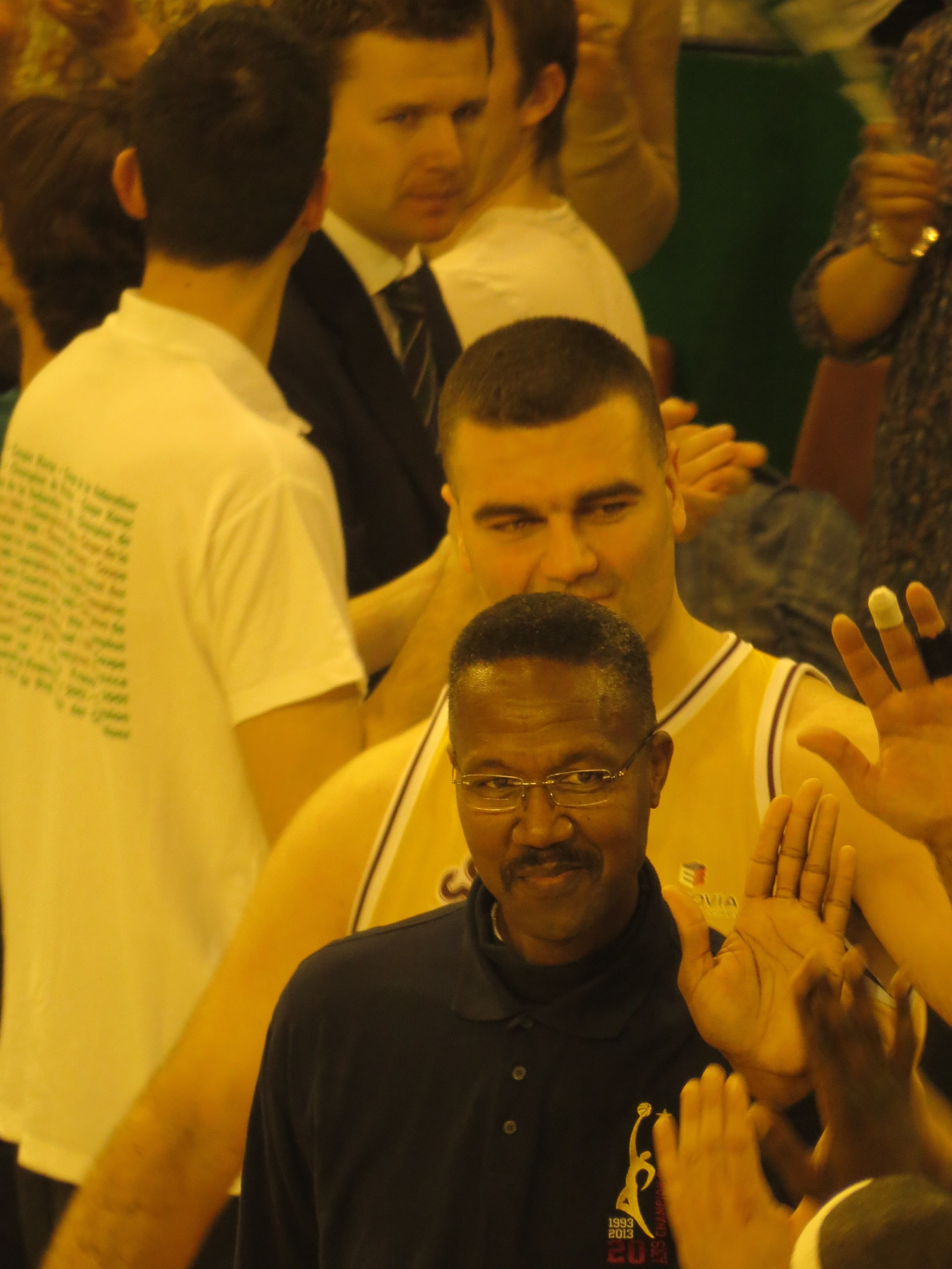 Willie Redden lors des 20 ans de la conquête de la Coupe des Clubs Champions.